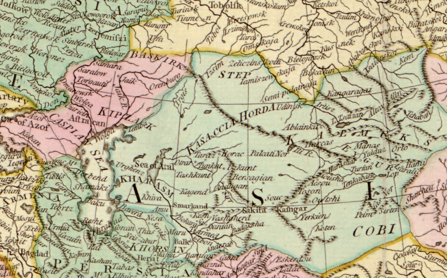 Казахское ханство (Казачья орда) на карте мира 1780 года.